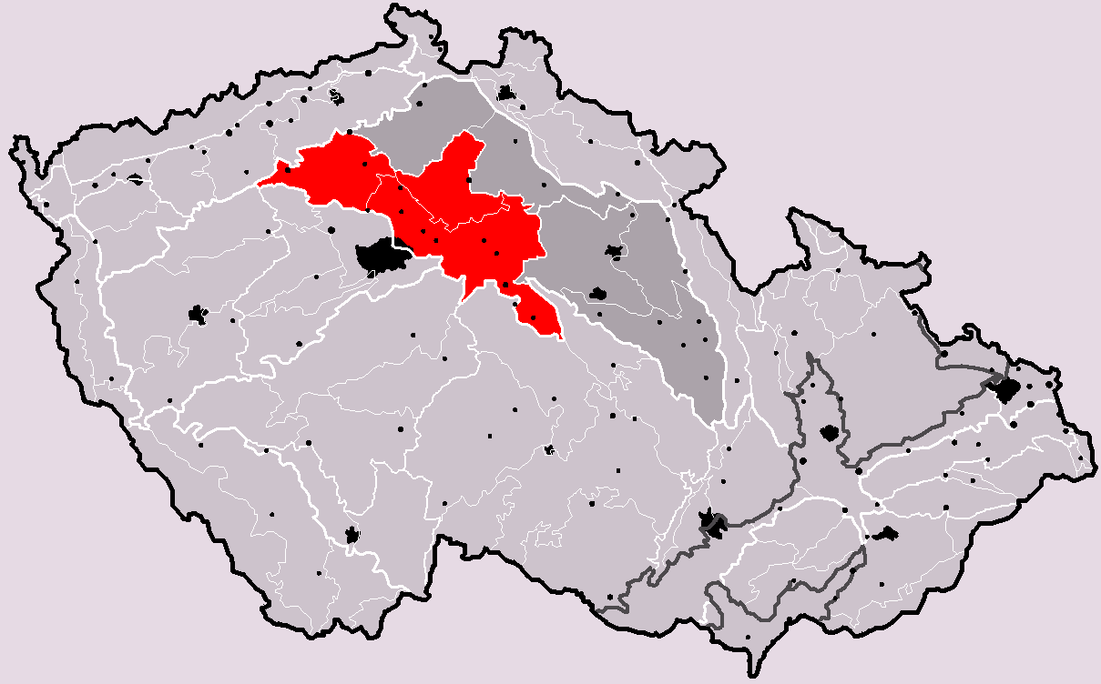 Poloha geomorfologické oblasti Středočeská tabule v rámci České republiky. Hercynský systém Hercynská pohoří I Česká vysočina I6 (VI) Česká tabule I6B (VIB) Středočeská tabule